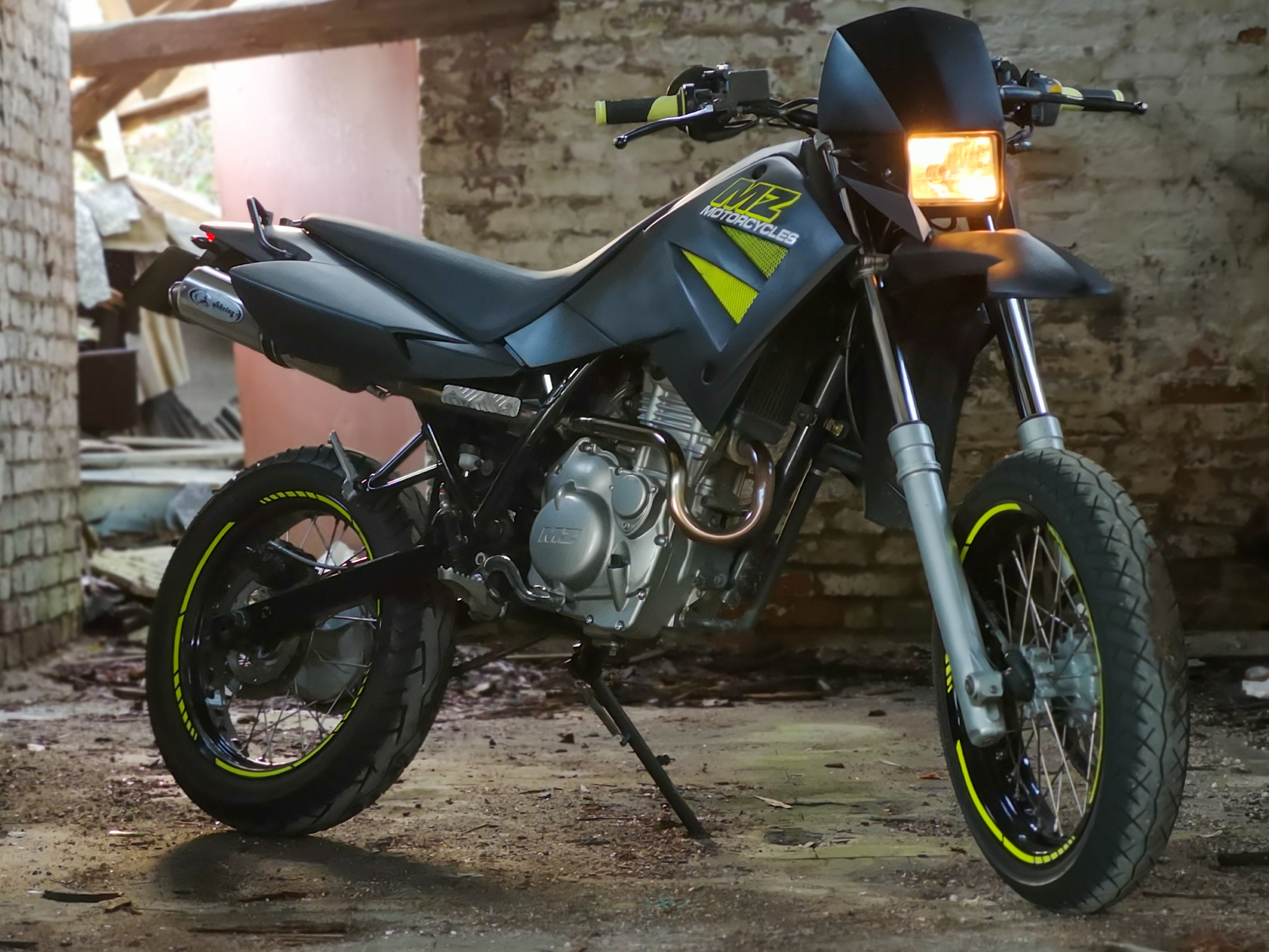 MZ 125 SM Baujahr 2005 von jan13.mz MZ 125 SM